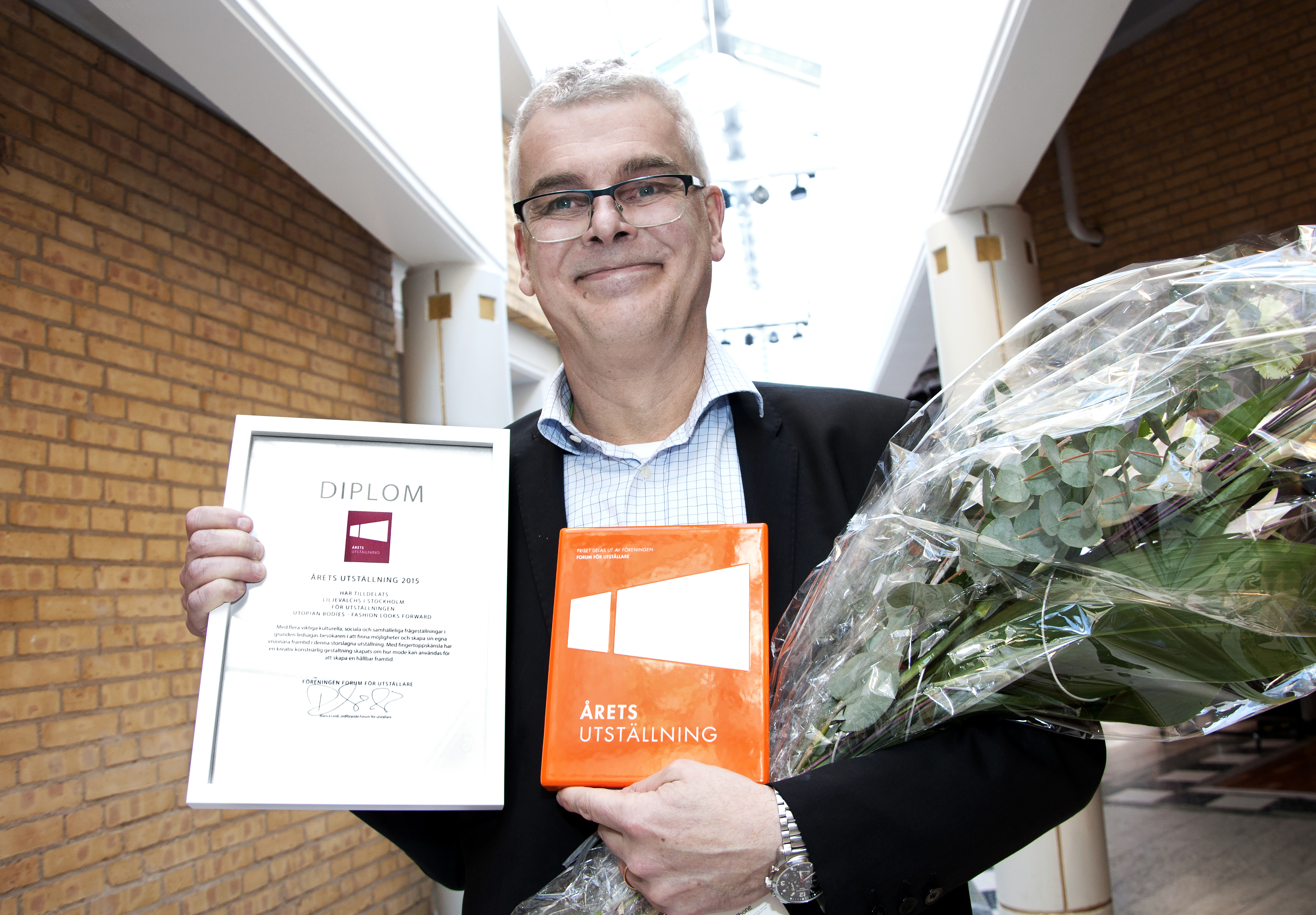 Mårten Castenfors har mottagit pris för Årets utställning av Forum för utställare. Uställning: Utopian bodies, Liljevalchs konsthall.